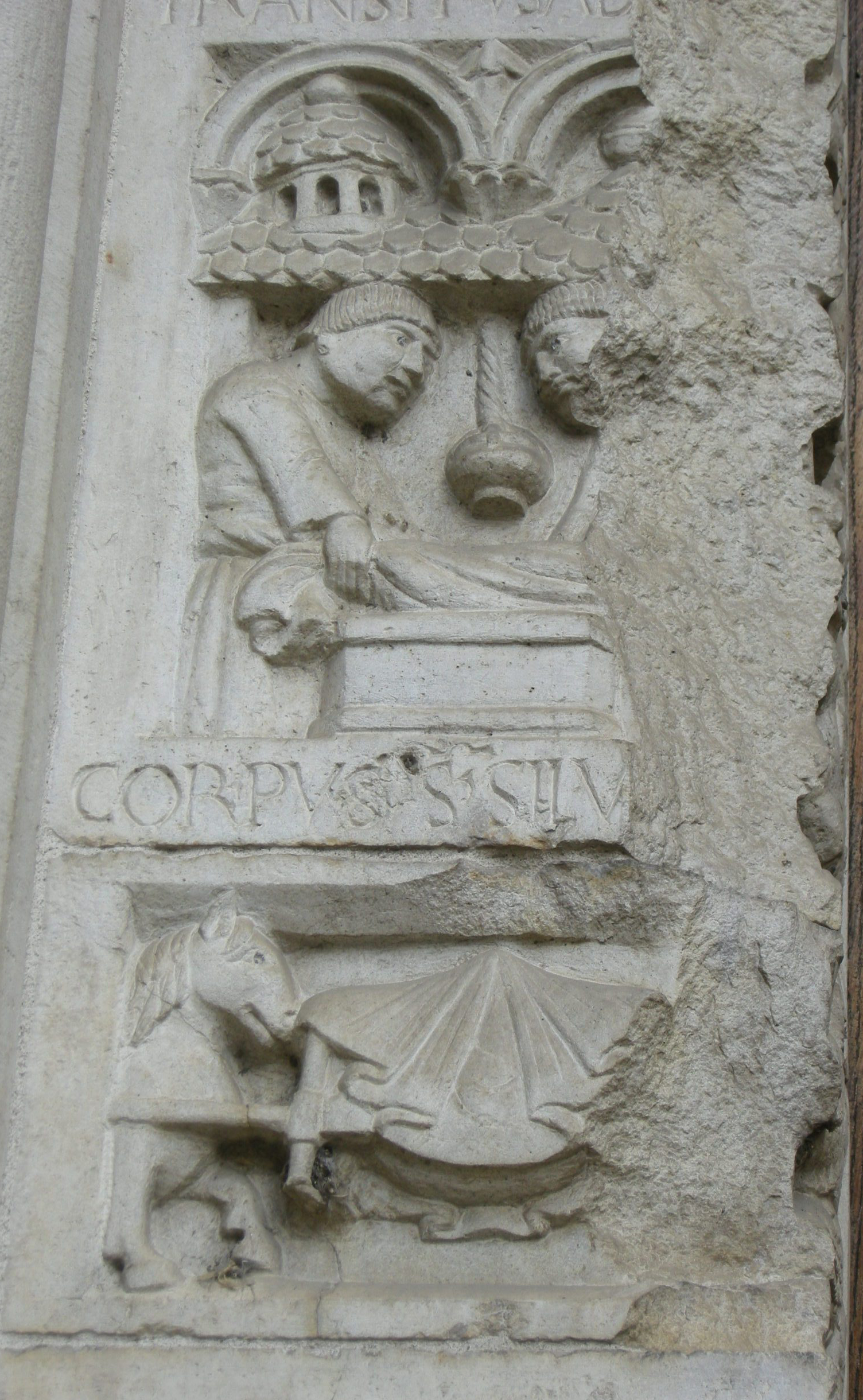 Abbazia di nonantola, portale di seguaci wiligelmo, stipite sx, formella 06, traslazione e sepoltuta del corpo di san silvestro nell'abbazia